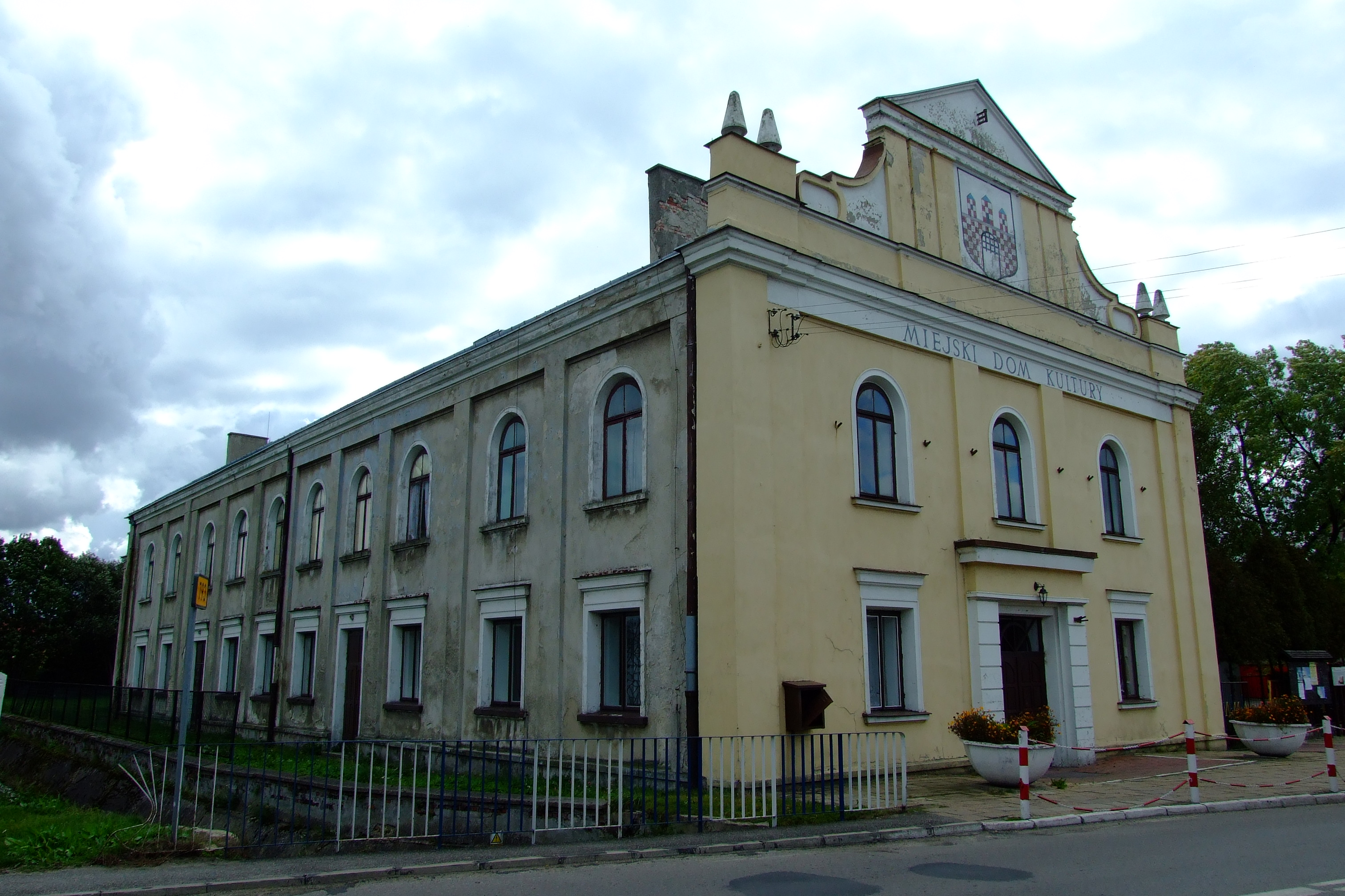 Kulturhaus in Żarki, früher Gebäude der Synagoge